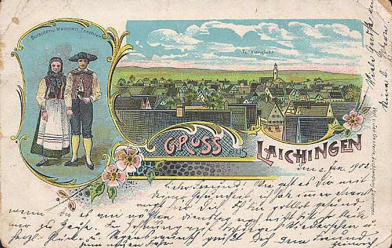 Ansichtskarte von Laichingen, Deutschland, 1902